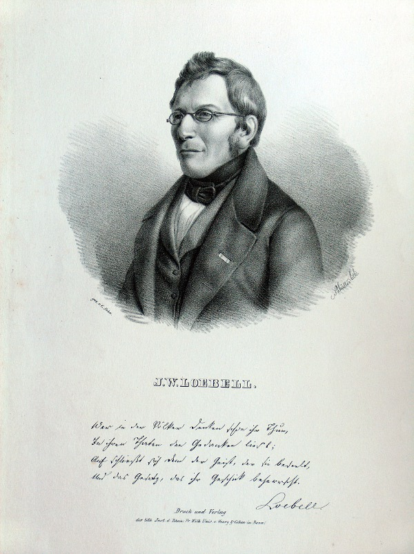 Johann Wilhelm Löbell, nach einer Vorlage von Carl Sohn. Druck und Verlag: Lithographisches Institut der Rheinischen Friedrich Wilhelm Universität von Henry & Cohen, Bonn